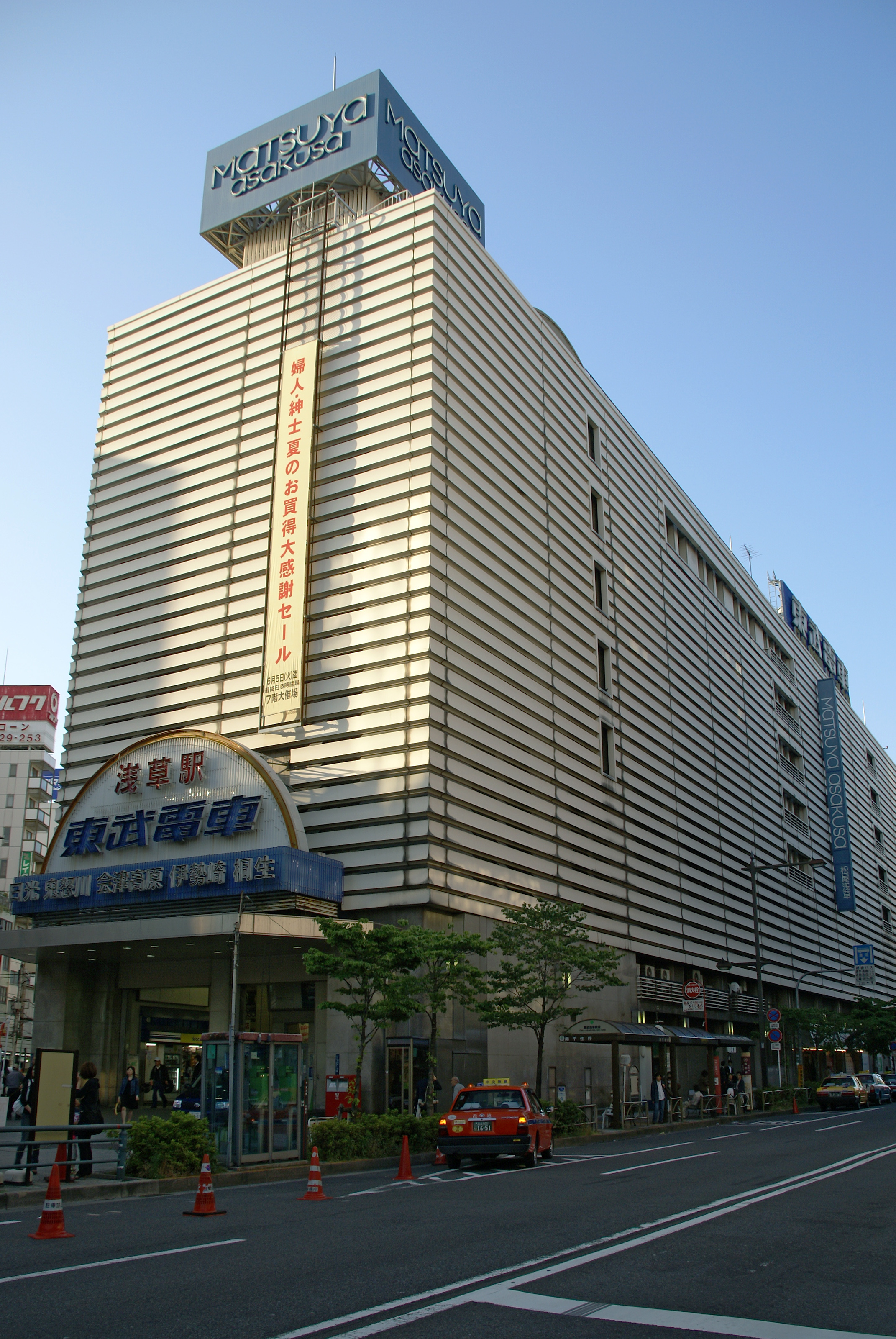 Asakusa Station in Taito-ku, Tokyo, Japan